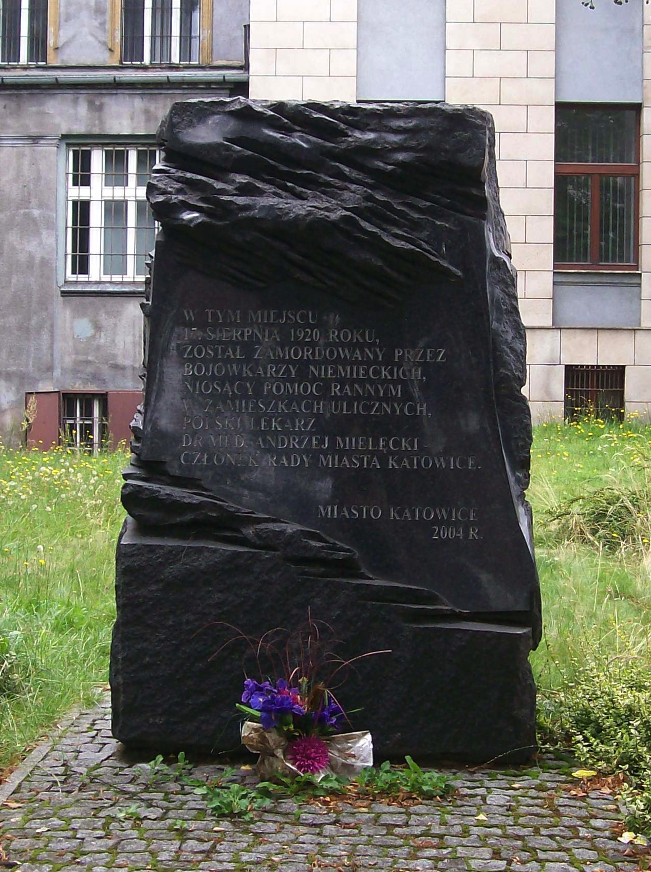 Pomnik upamiętniający Andrzeja Mielęckiego, w miejscu w którym został zamordowany - Katowice ul. Warszawska.